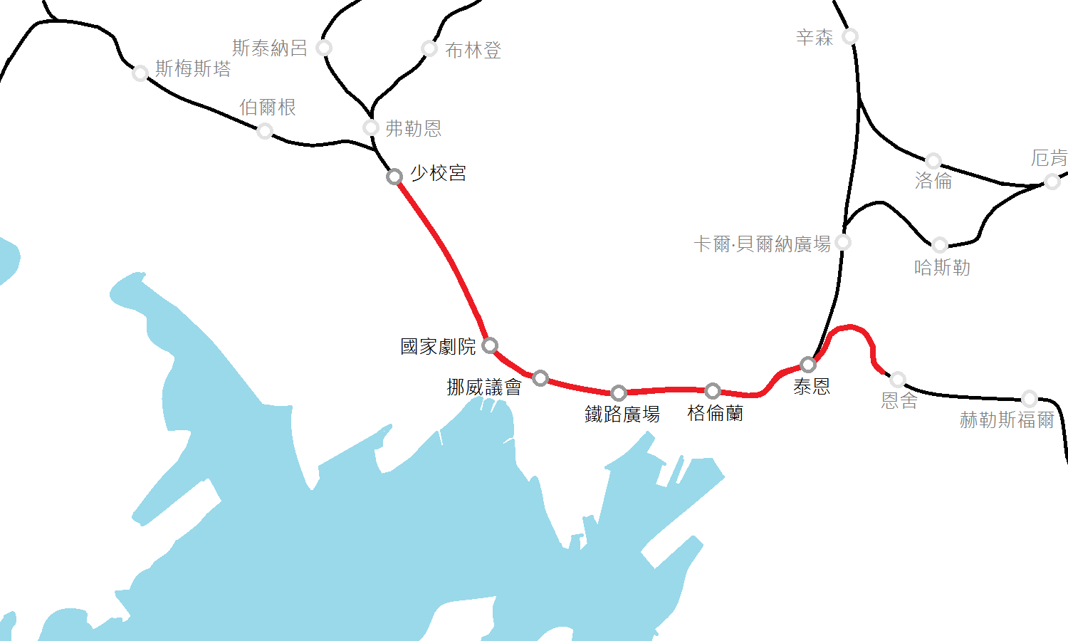 共用隧道的地圖。紅色路線表示共用隧道。